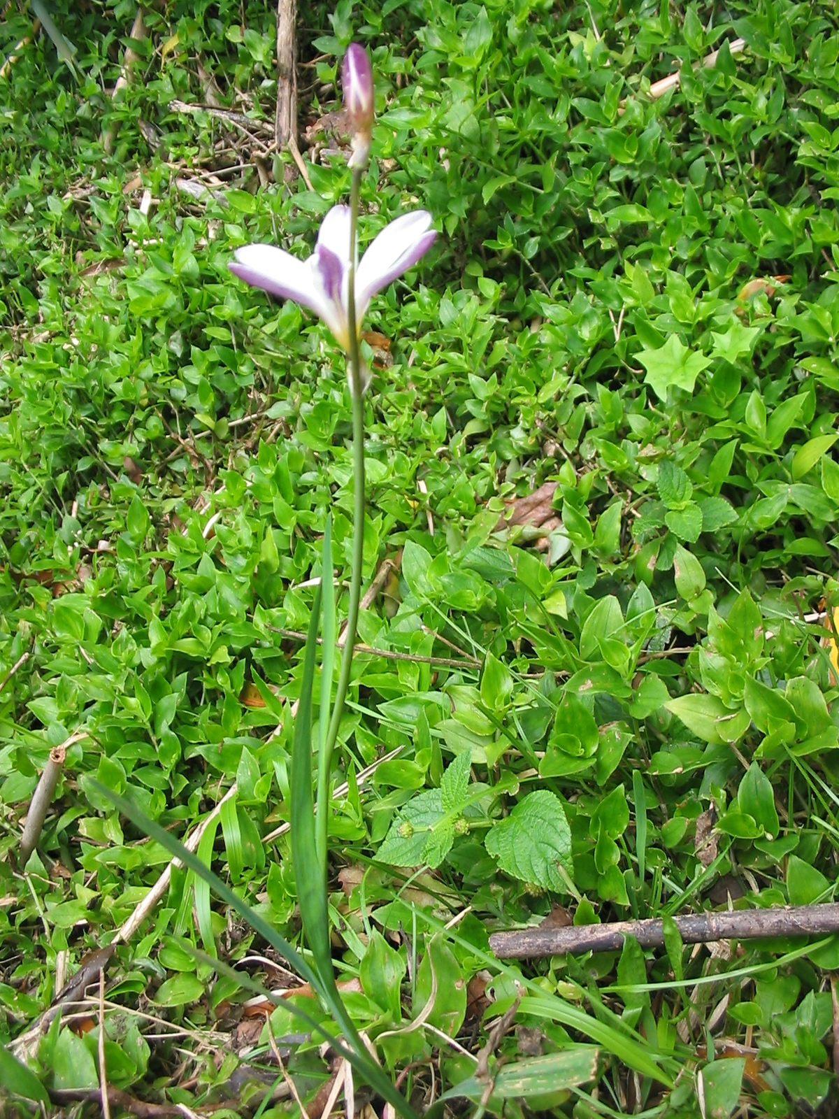 Sparaxis bulbifera - Habitus